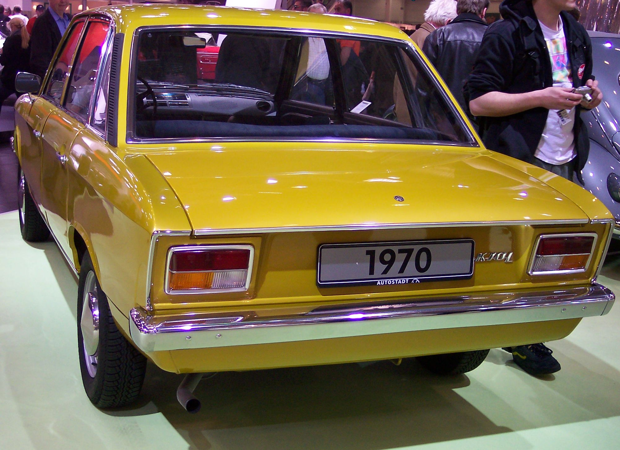 VW K70